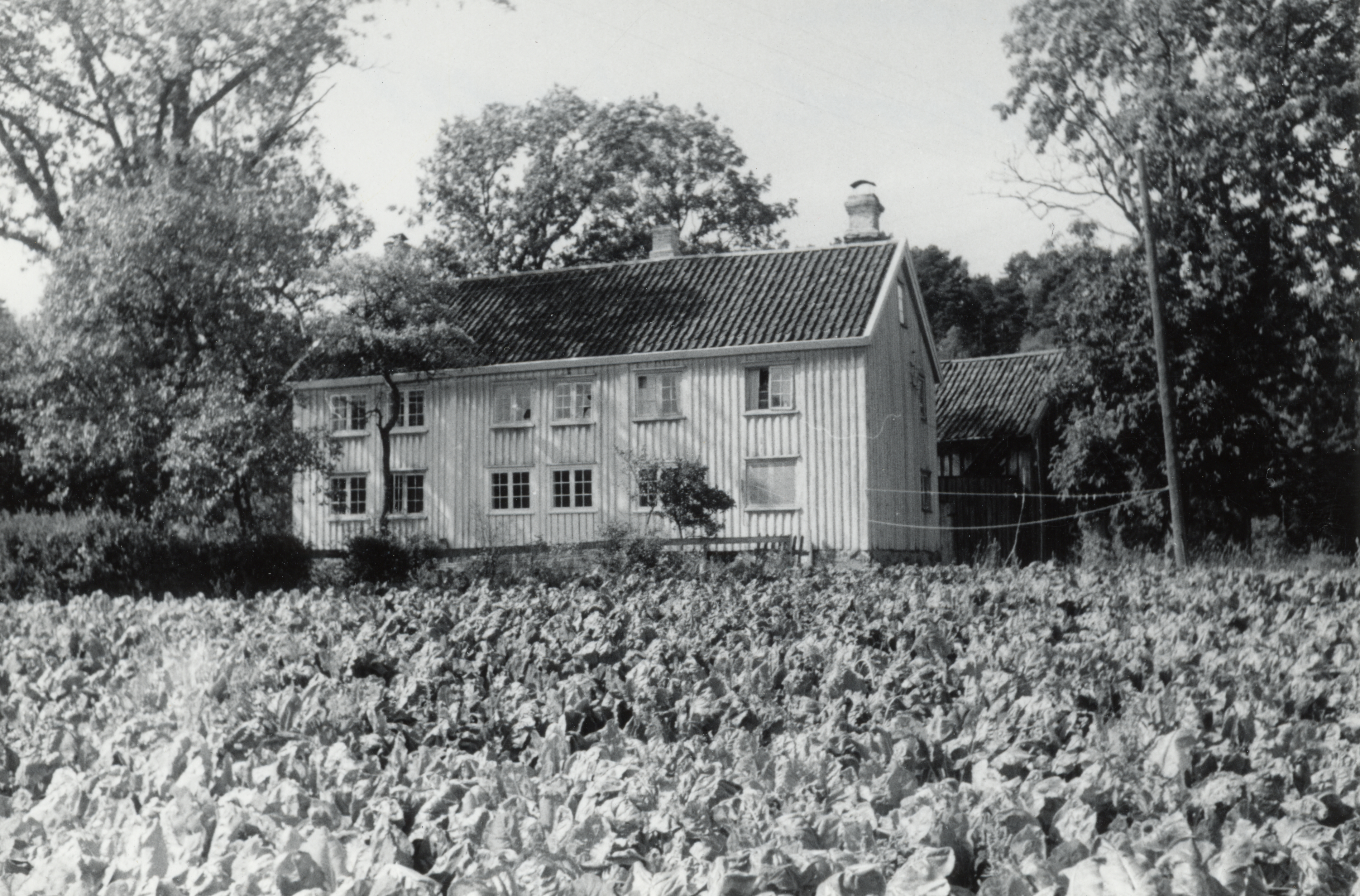 Saltrød, Aust-Agder This image on crowdsourcing geotagging platform Fotodugnad